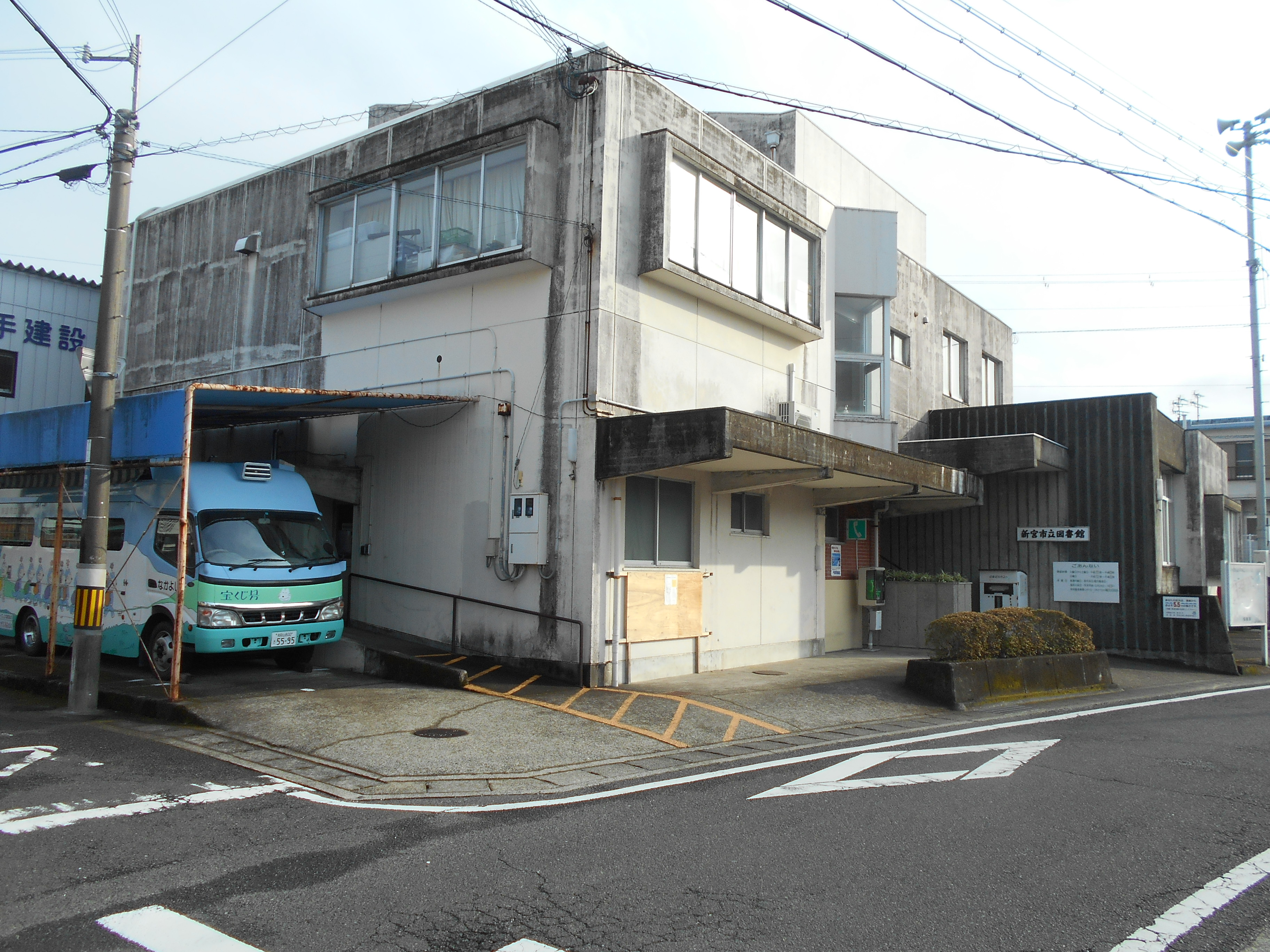 新宮市立図書館